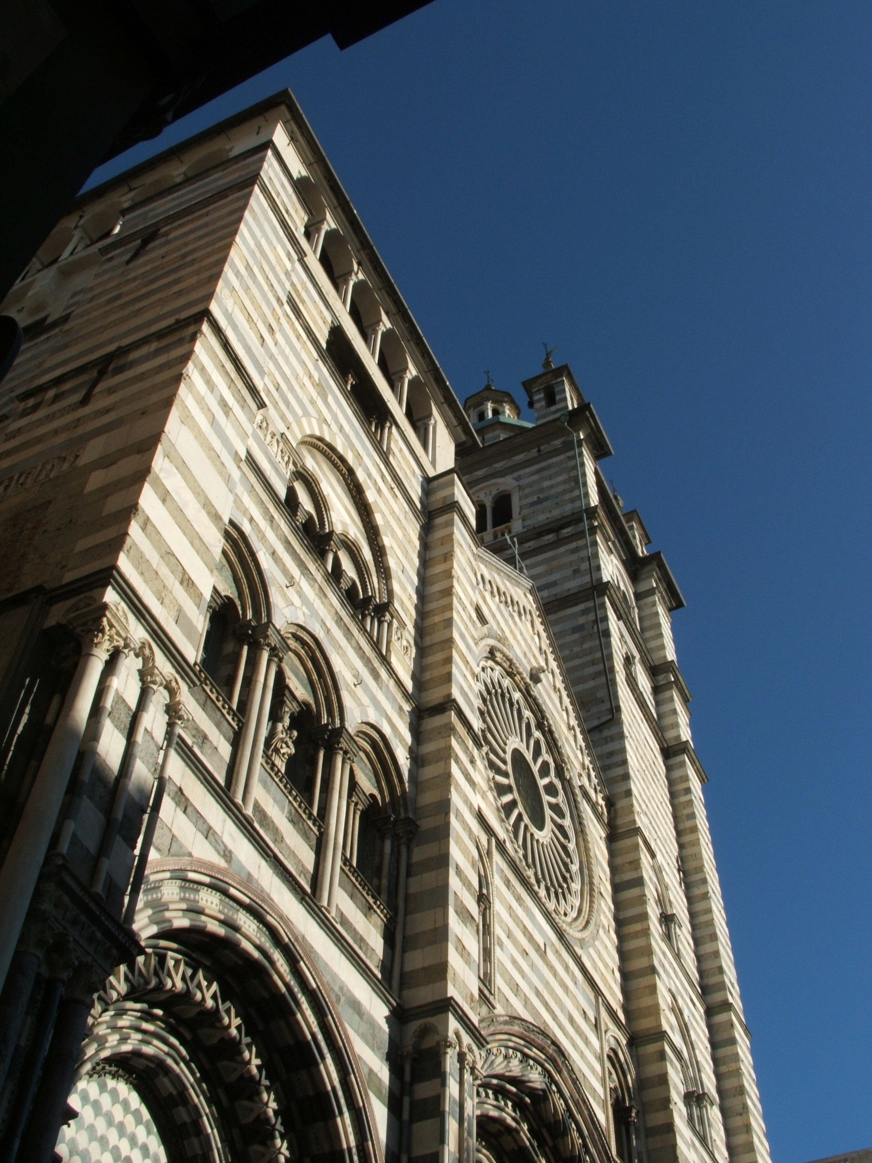 Facciata della cattedrale di San Lorenzo a Genova.